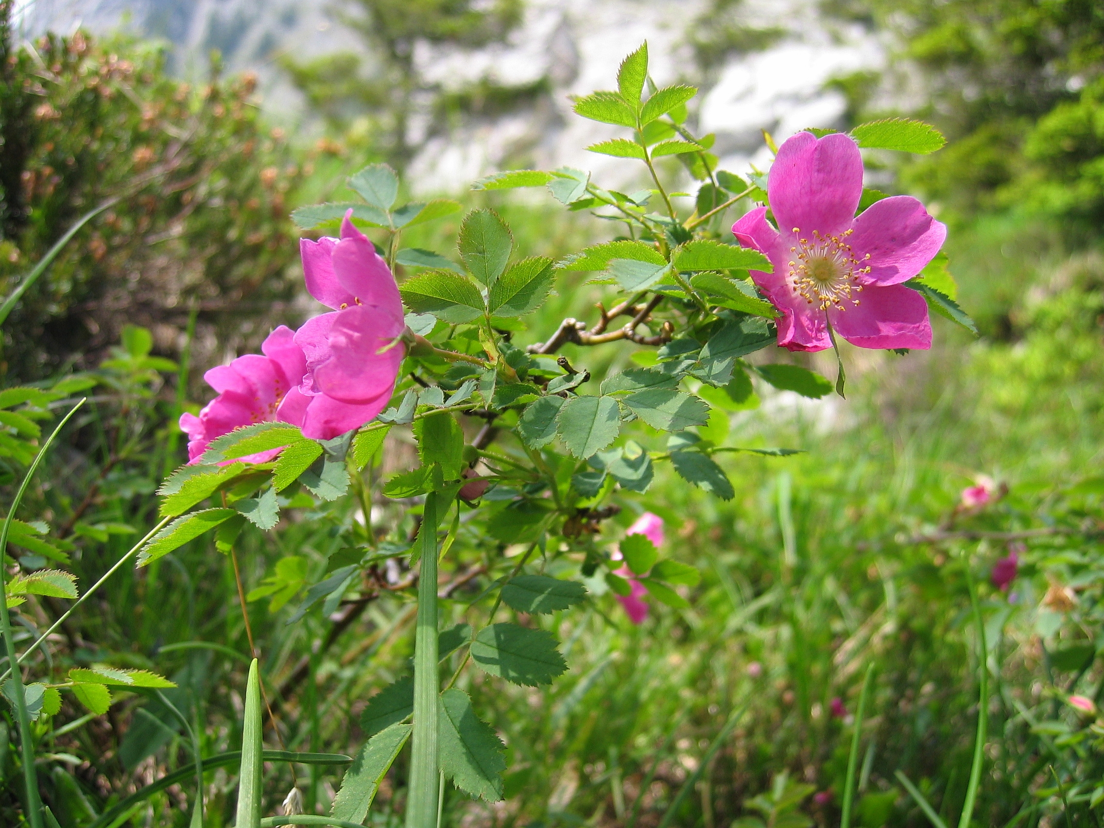 Rosa pendulina, Traunstein, Upper Austria, Austria